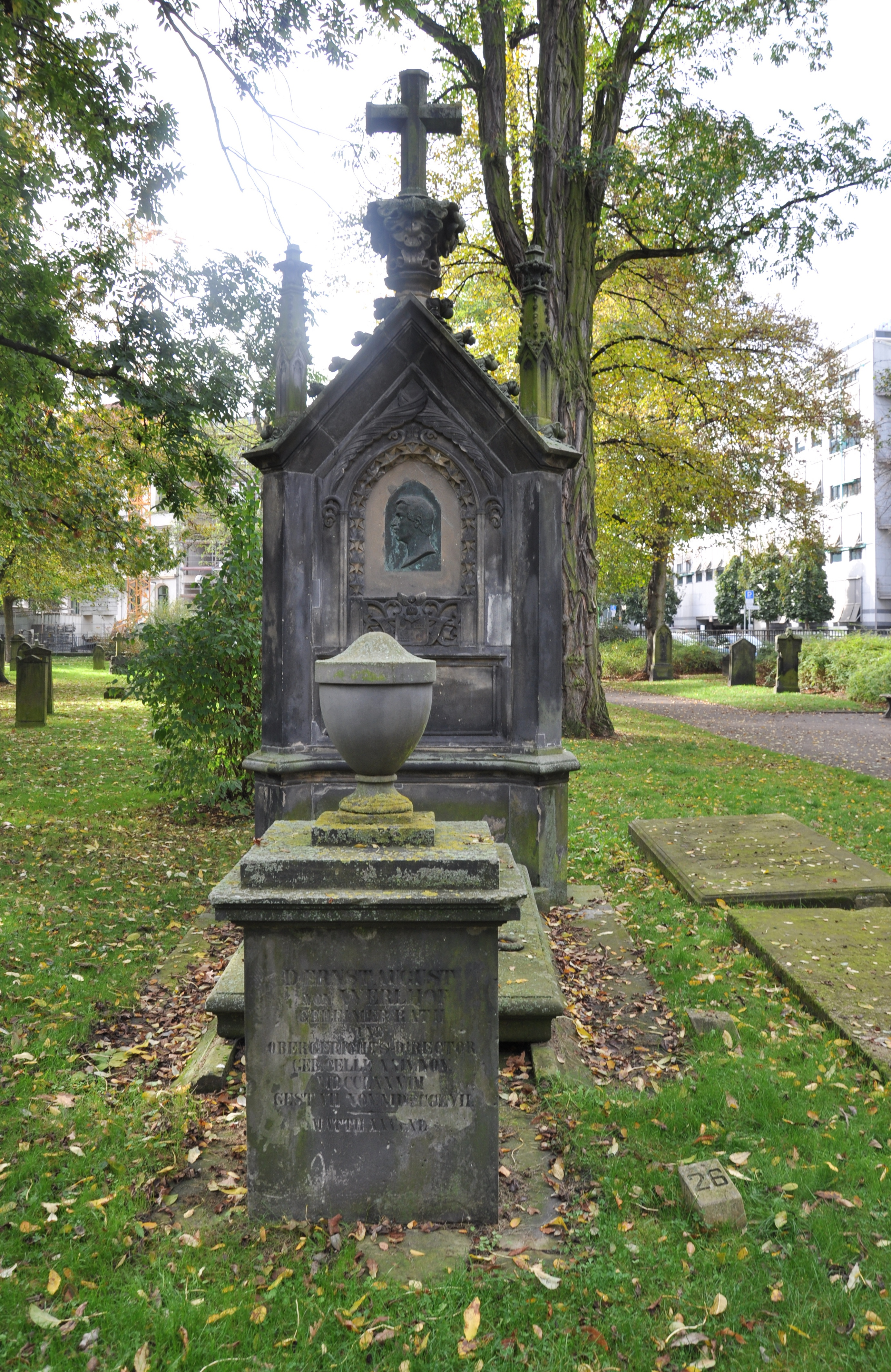 Hannover, Gartenfriedhof, Grabmale Werlhof vorne: D. Ernst August von Werlhof (1778-1857), Geheimer Rath und Obergerichtsdirektor, und Louise Maria Dorothee Clara von Werlhof, geb. von der Wense (1793–1818) hinten: Ludwig Albert Friedrich Wilhelm Gottfried von Werlhof (1818–1836)